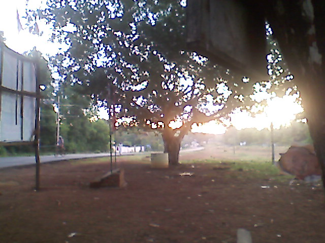 കോട്ടച്ചന്തയിലെ ഒരു പ്രഭാത കാഴ്ച